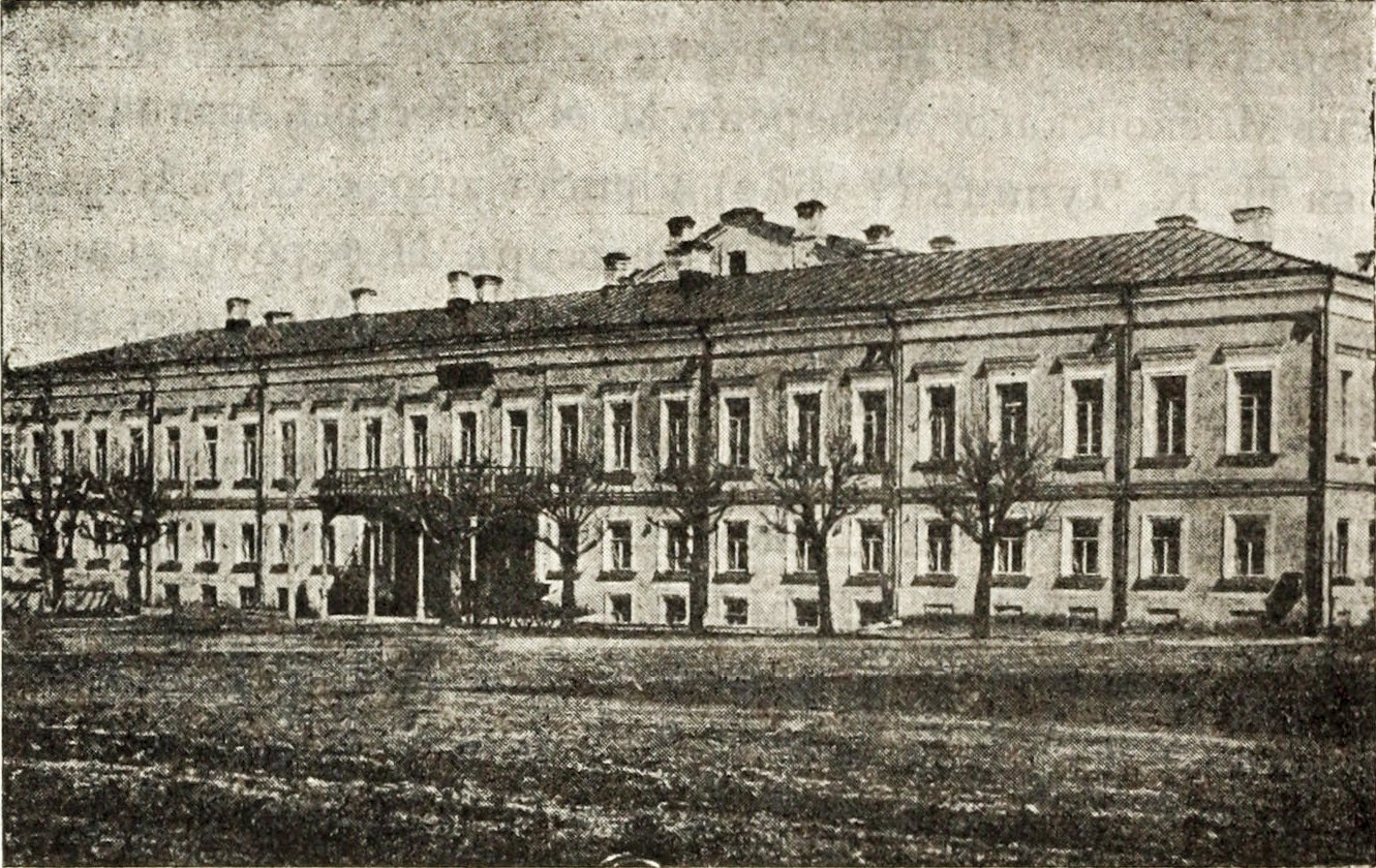 Верхоланцев. 70 Алексеевское реальное училище